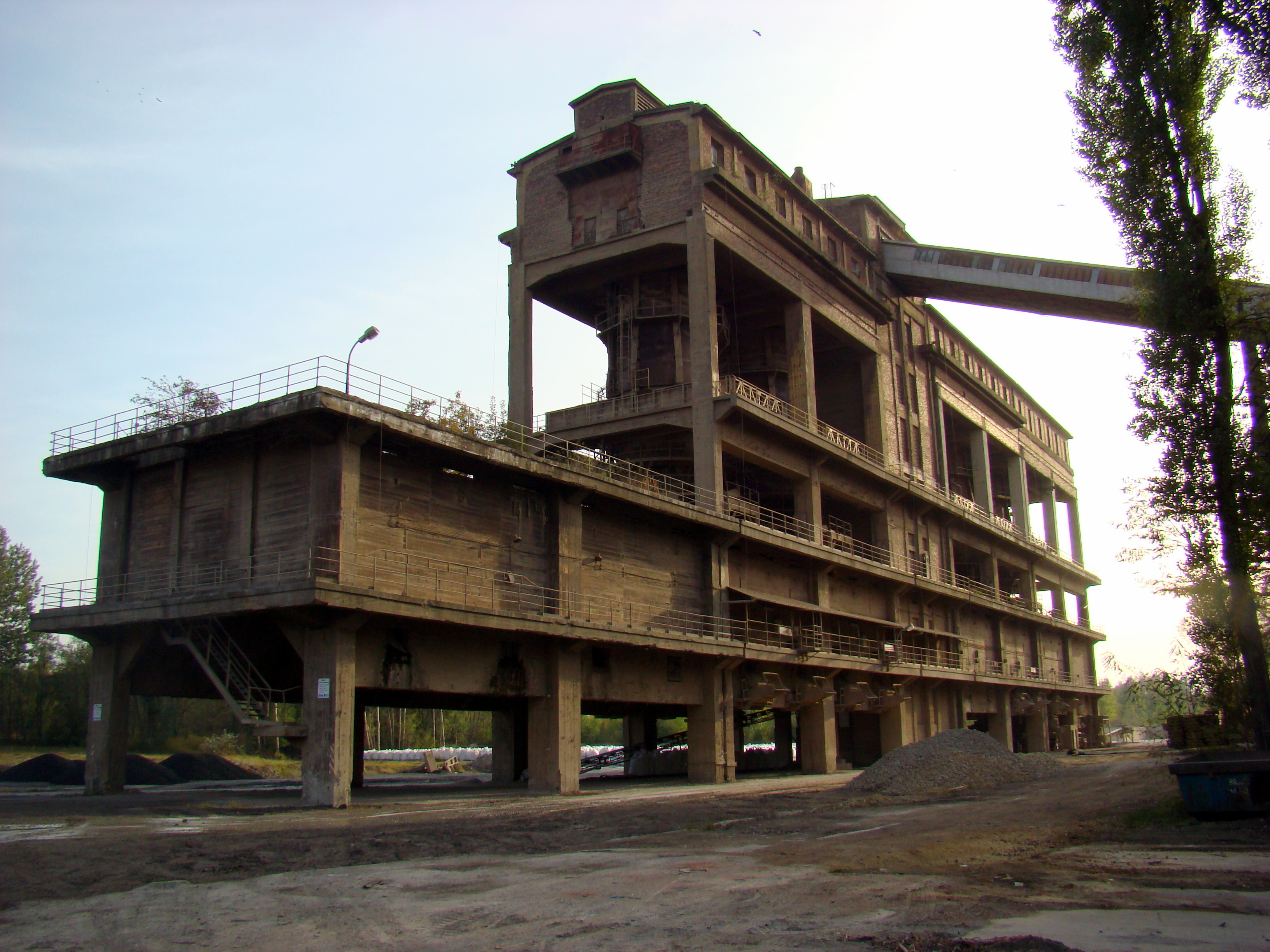 Dawne Zakłady Górniczo-Hutnicze Sabinów w Częstochowie wybudowane w latach 1956-1968. Piece prażalnicze. Od 2002 roku znajdują się tutaj Zakłady Wapiennicze Lhoist S.A. produkujące wyroby dolomitowe.